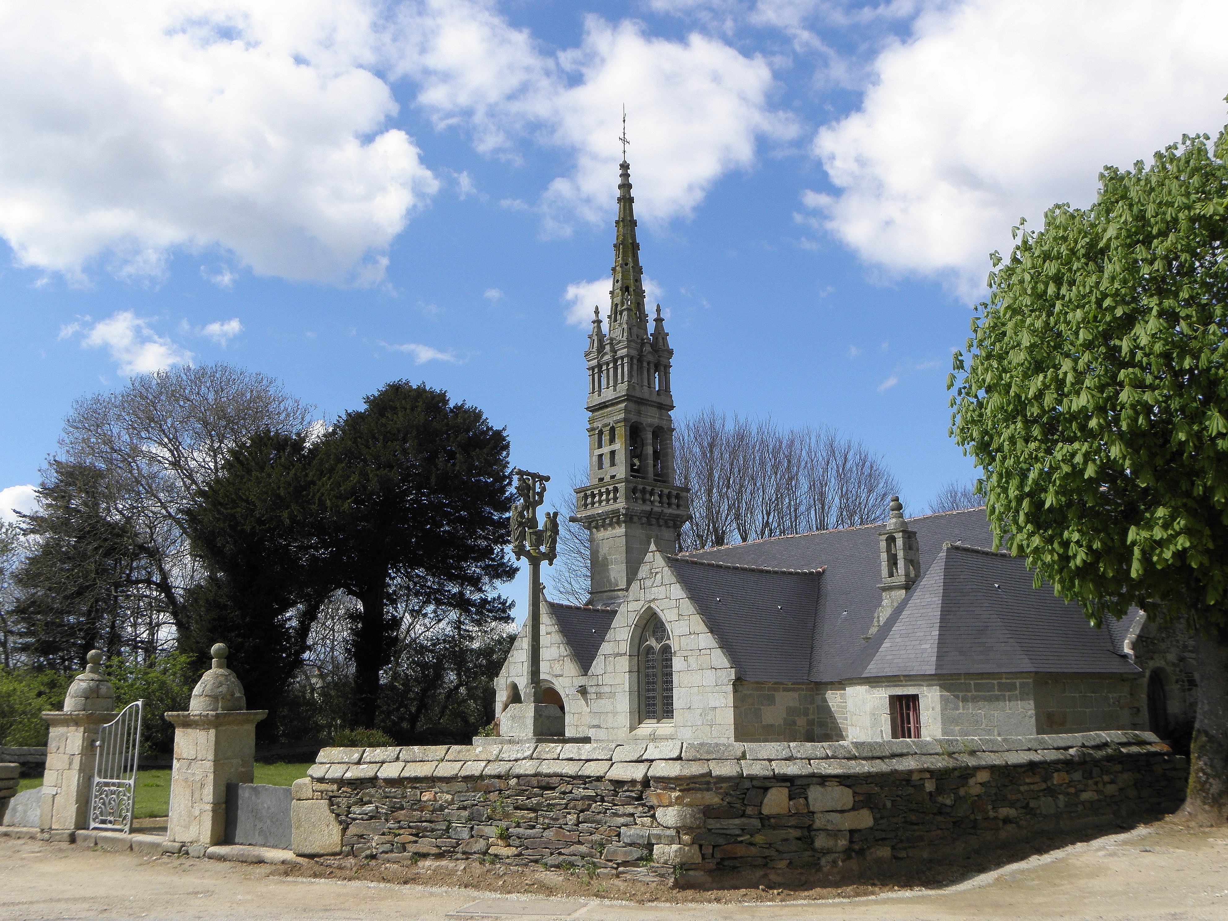 Vue méridionale de l'église Saint-Méen de Pléven (29). .